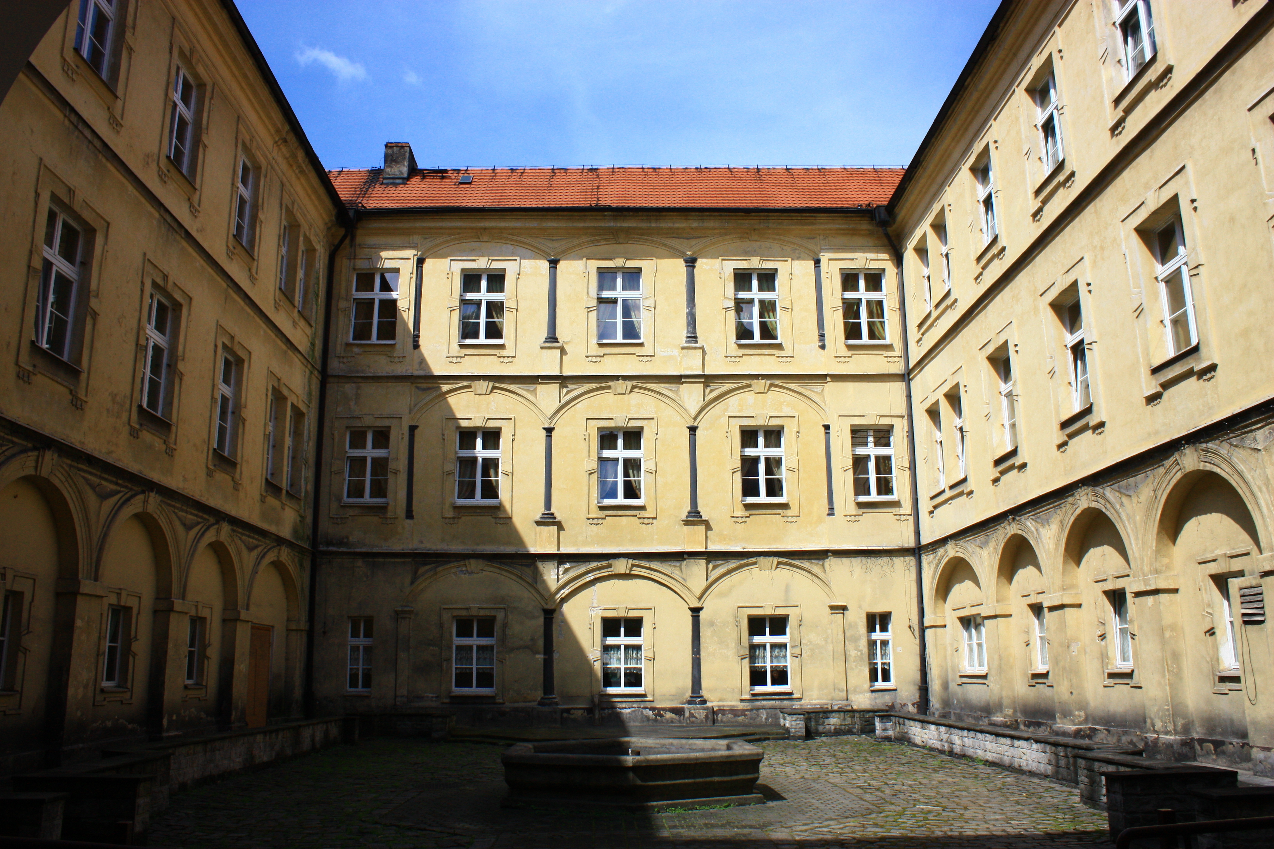 Prószków, zespół zamkowy